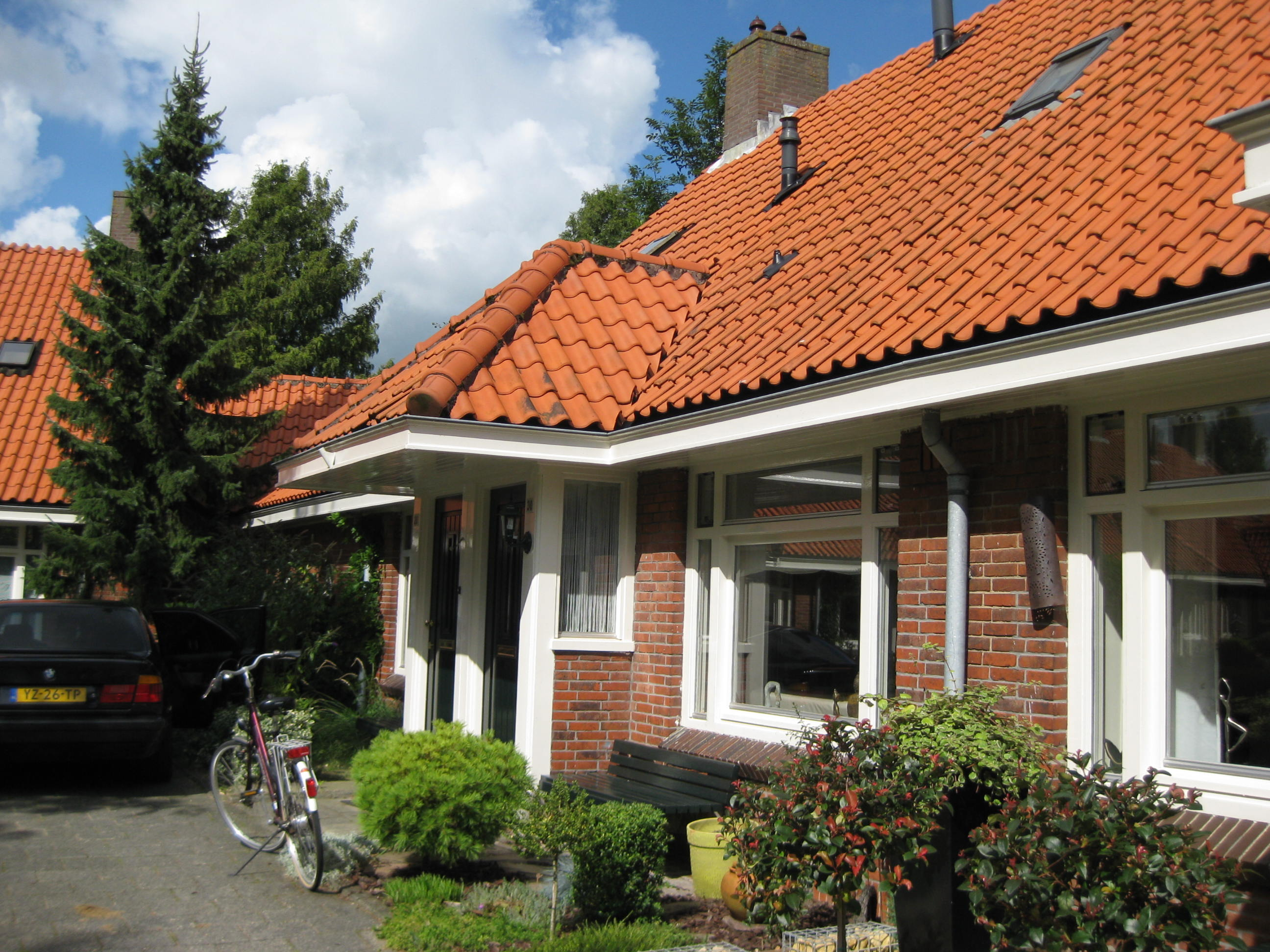 Monnikendammerplantsoen 30, Amsterdam-Noord